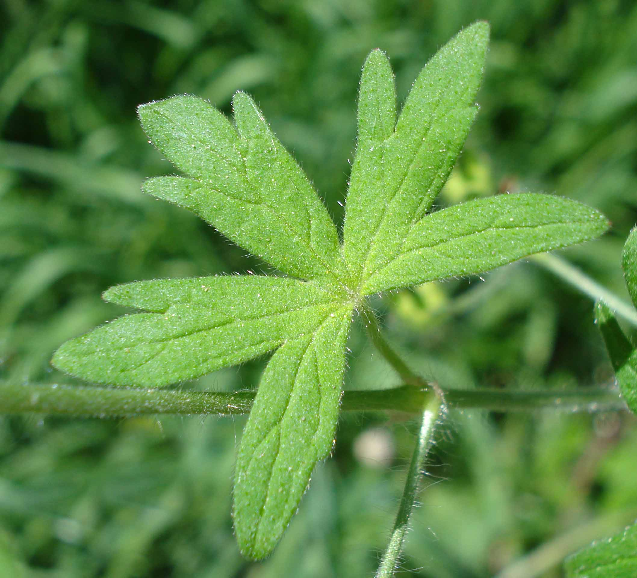 Geranium molle (Unterfranken, Germany)